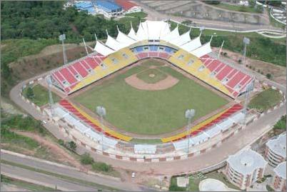 Estadio Metropolitano de San Cristóbal en una vista aerea.